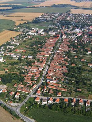 Letecký pohlad na obec Chynorany